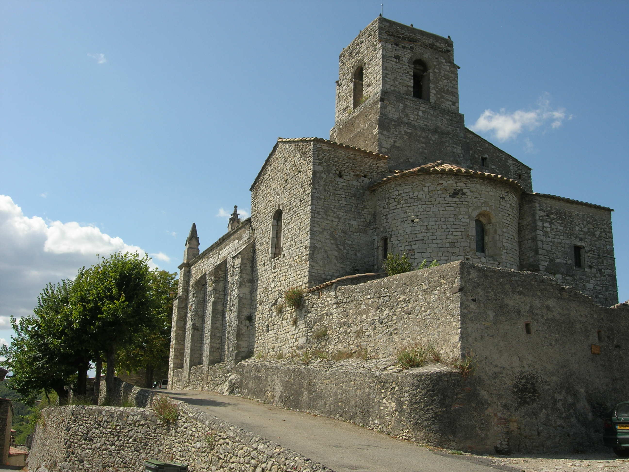 Eglise de Saint-Thomé, Ardèche, France